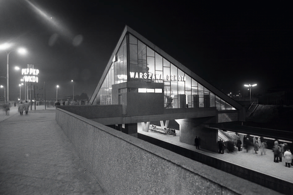 Oryginalny opis: Widok zewnętrzny budynku stacji. Widoczny podświetlony neon "WKD, PKP". Z prawej widać peron stacji. Zdjęcie pochodzi z 1963. Jako że przystanek został uruchomiony 29 września 1963, a na zdjęciu na peronie widoczni są pasażerowie, można domniemywać, że zdjęcie wykonano między 29 września a 31 grudnia 1963.